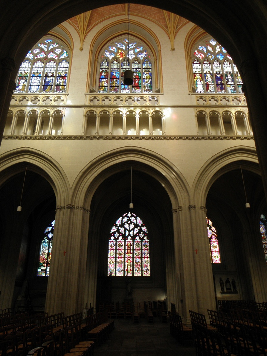 Élévation de la nef de la cathédrale Saint-Corentin de Quimper (29). .